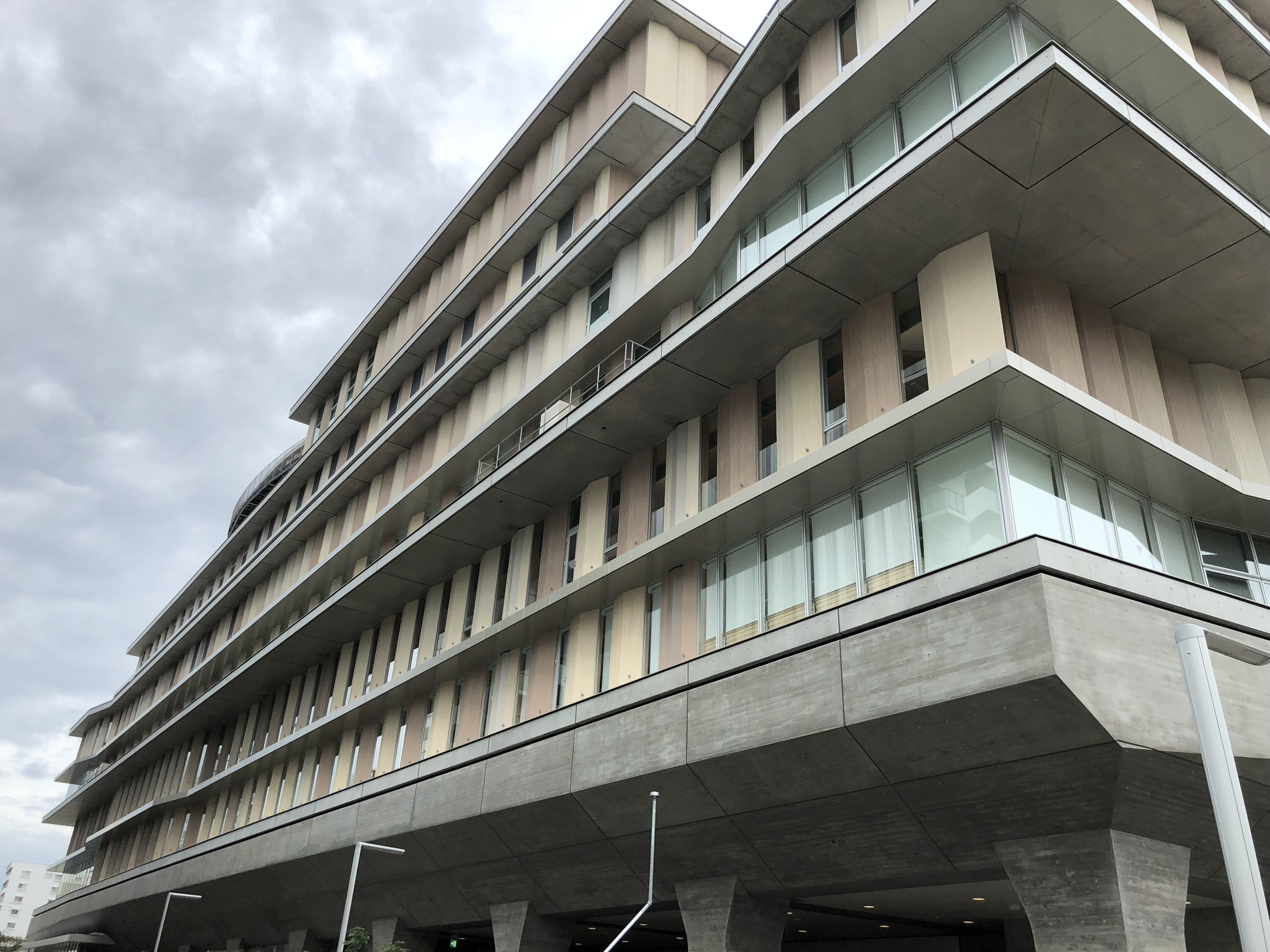 2018年9月11日撮影。オーテピア外観。帯屋町側から撮影。